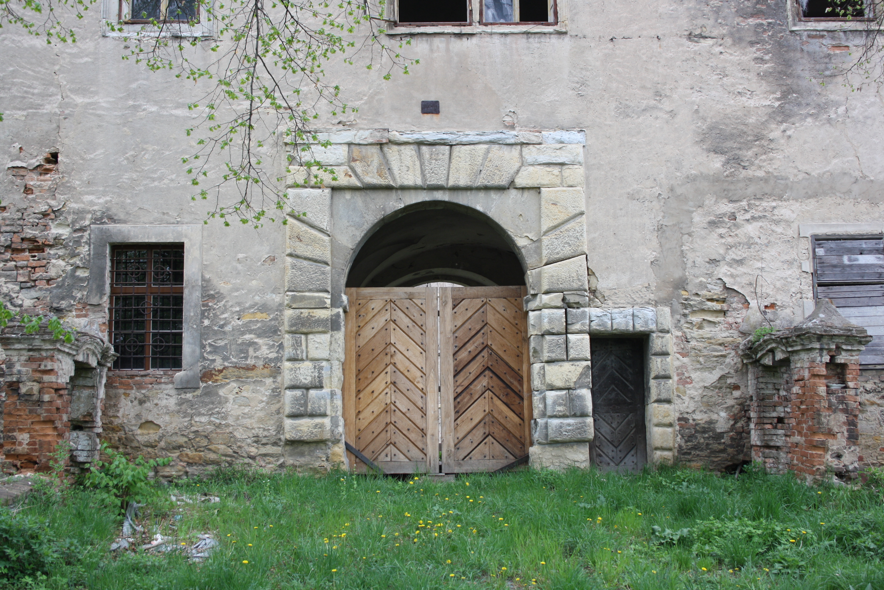 Vstup do encovanského zámku (pohled od jihu).